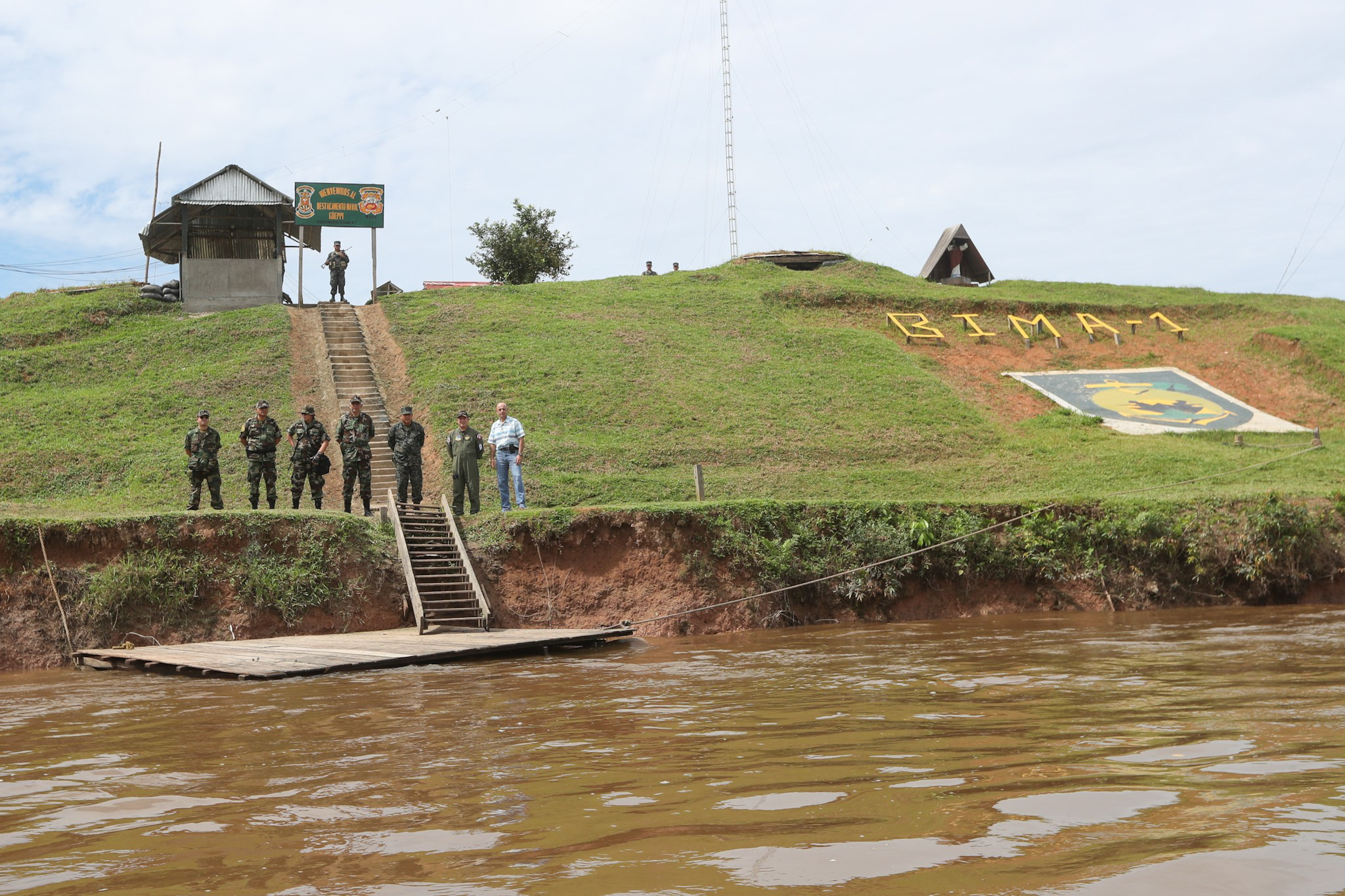 Güeppí durante un operativo militar policial con la presencia del presidente Martín Vizcarra